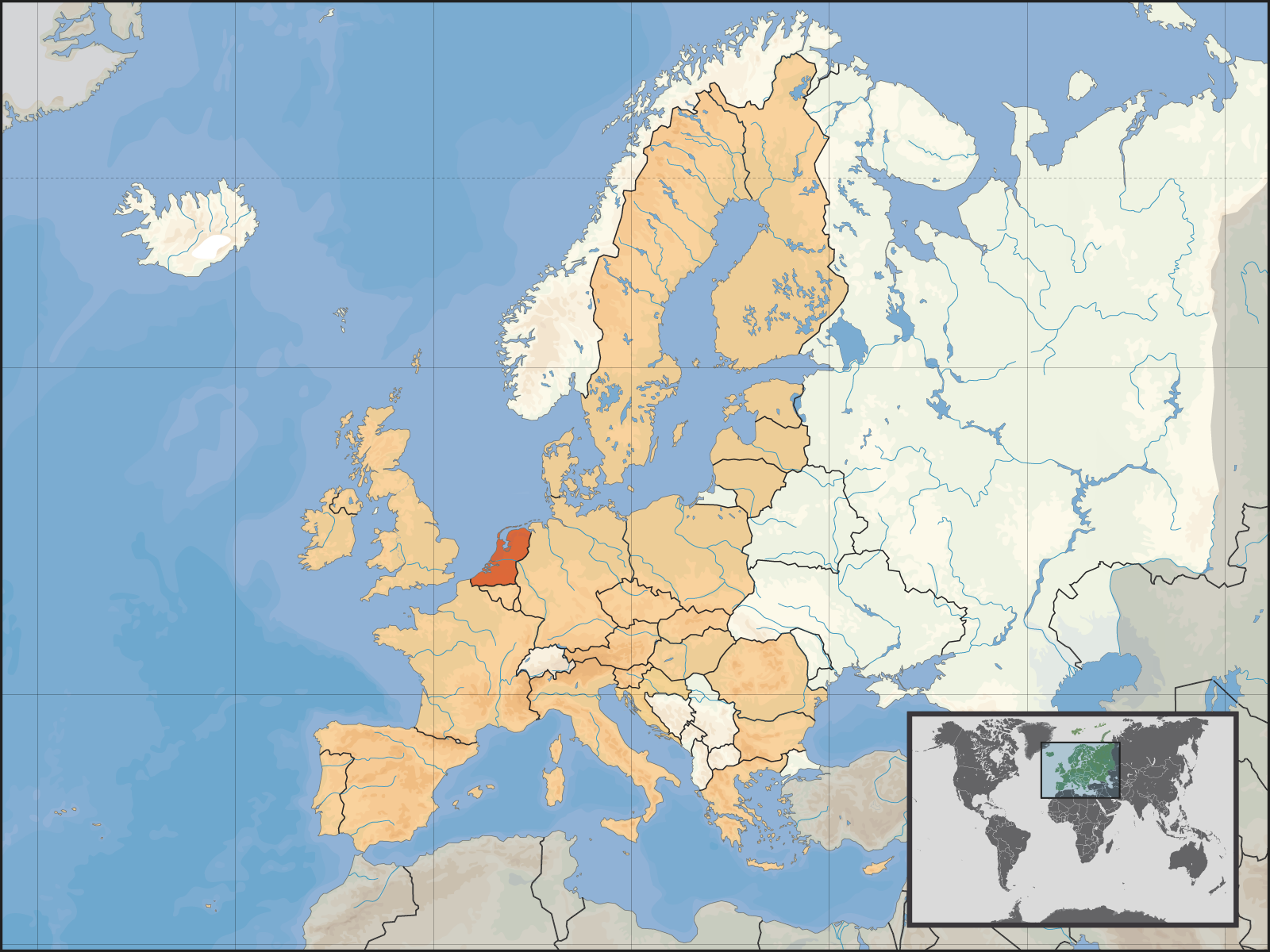 De ligging van Groot-Nederland in Europa en de EU.